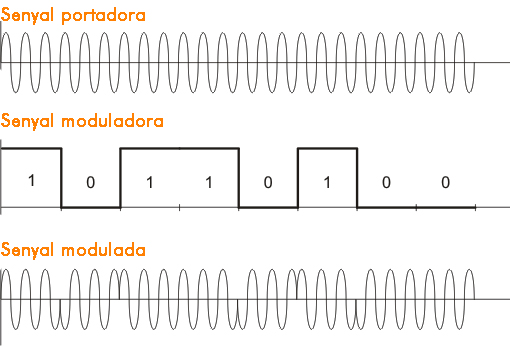 psk